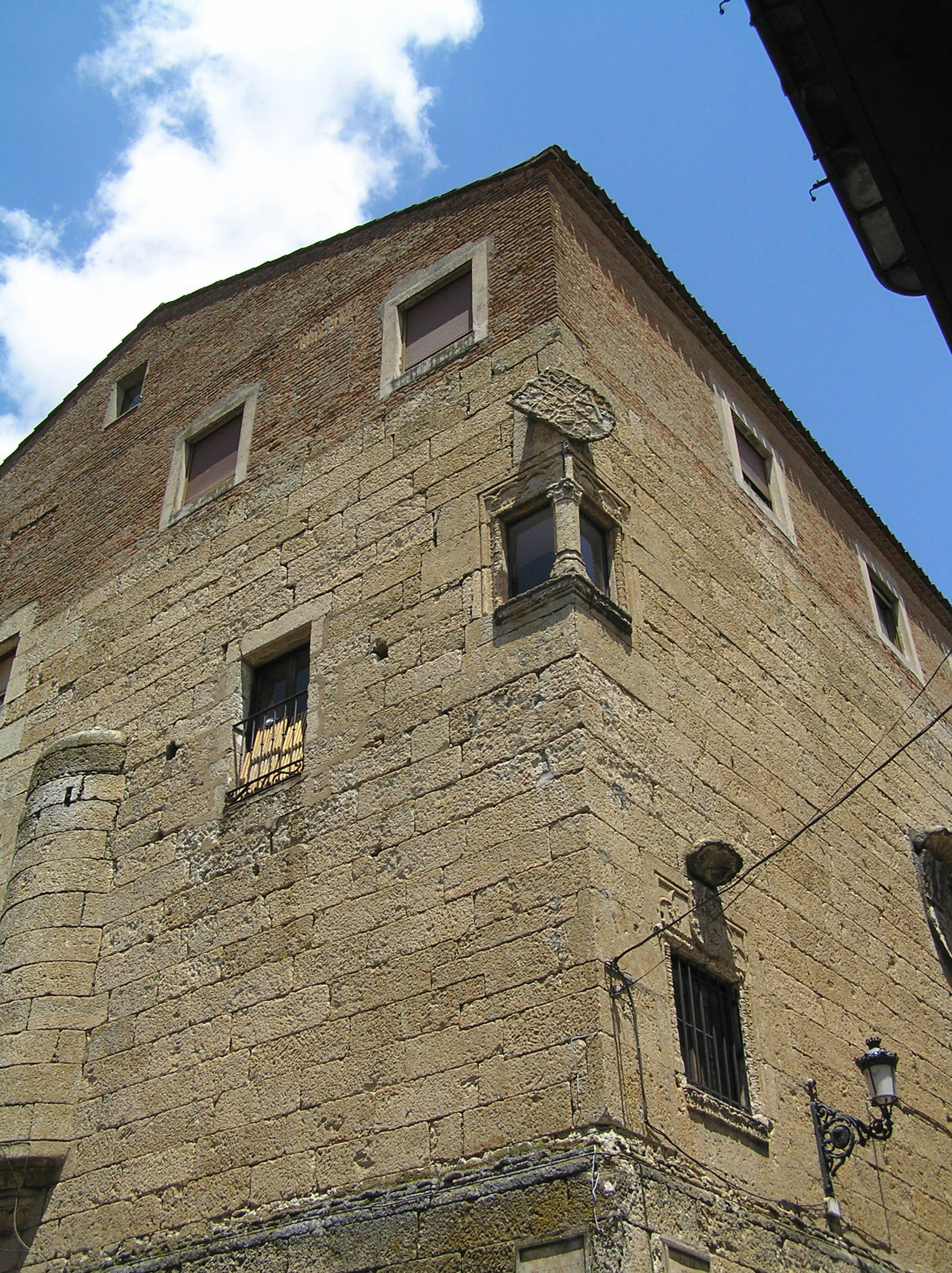 Casa de la cadena. Vista general. Ciudad Rodrigo (provincia de Salamanca, España)